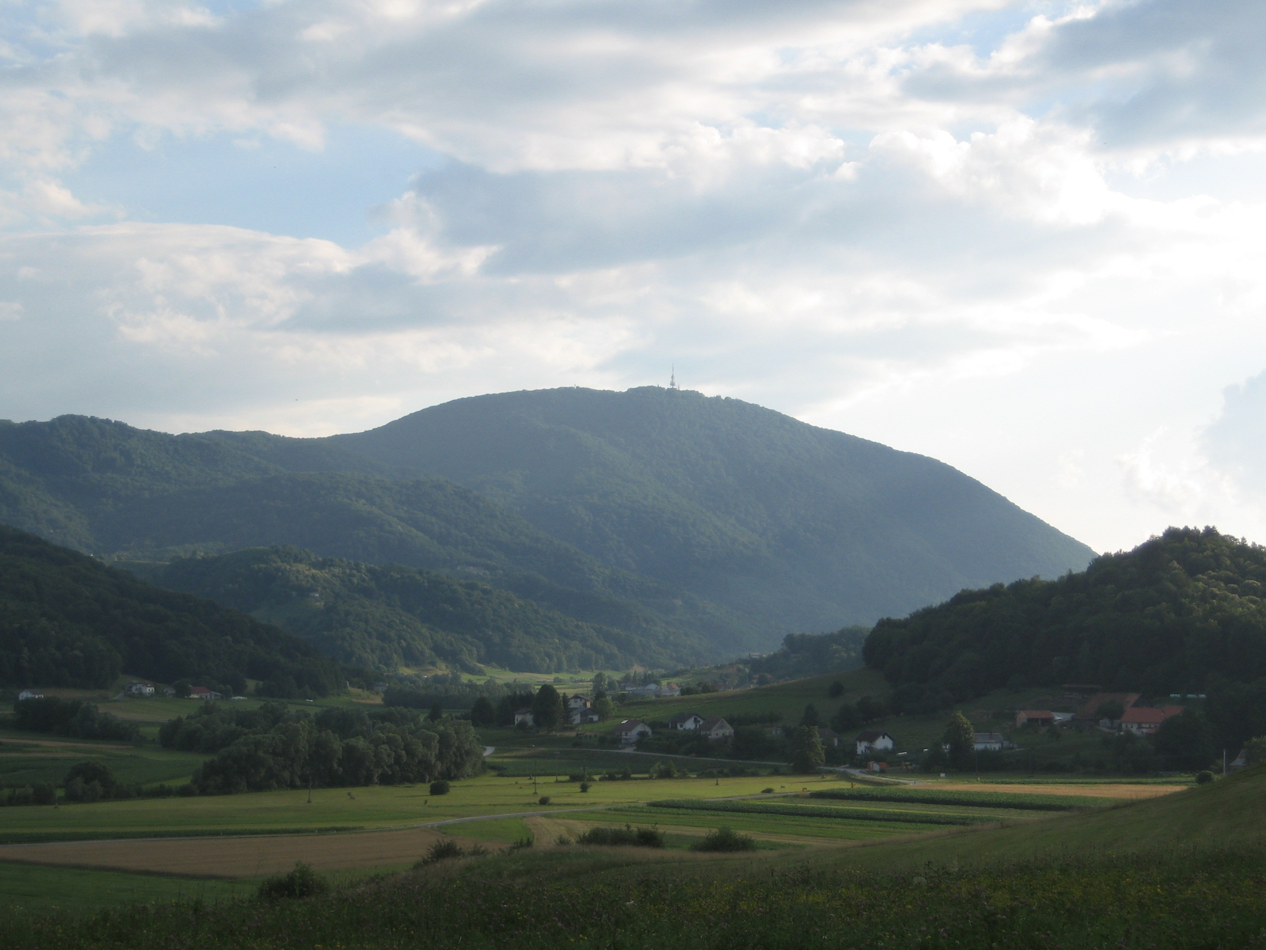 Boč Slovenia